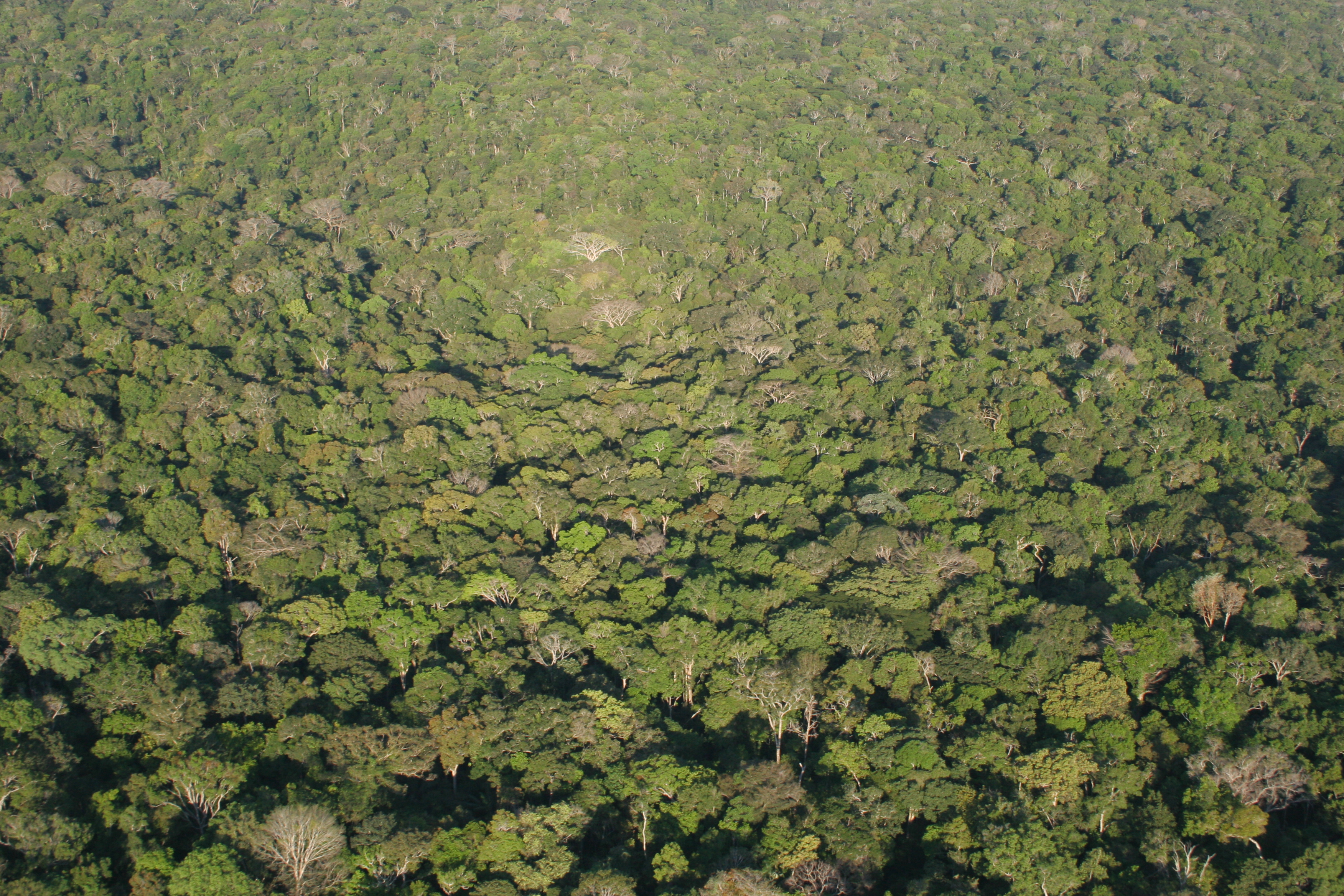 AMAZON RAINFOREST IN BRAZIL IN MANAUS - Amazonia fotos aérea região de Manaus 2005 AM Brasil